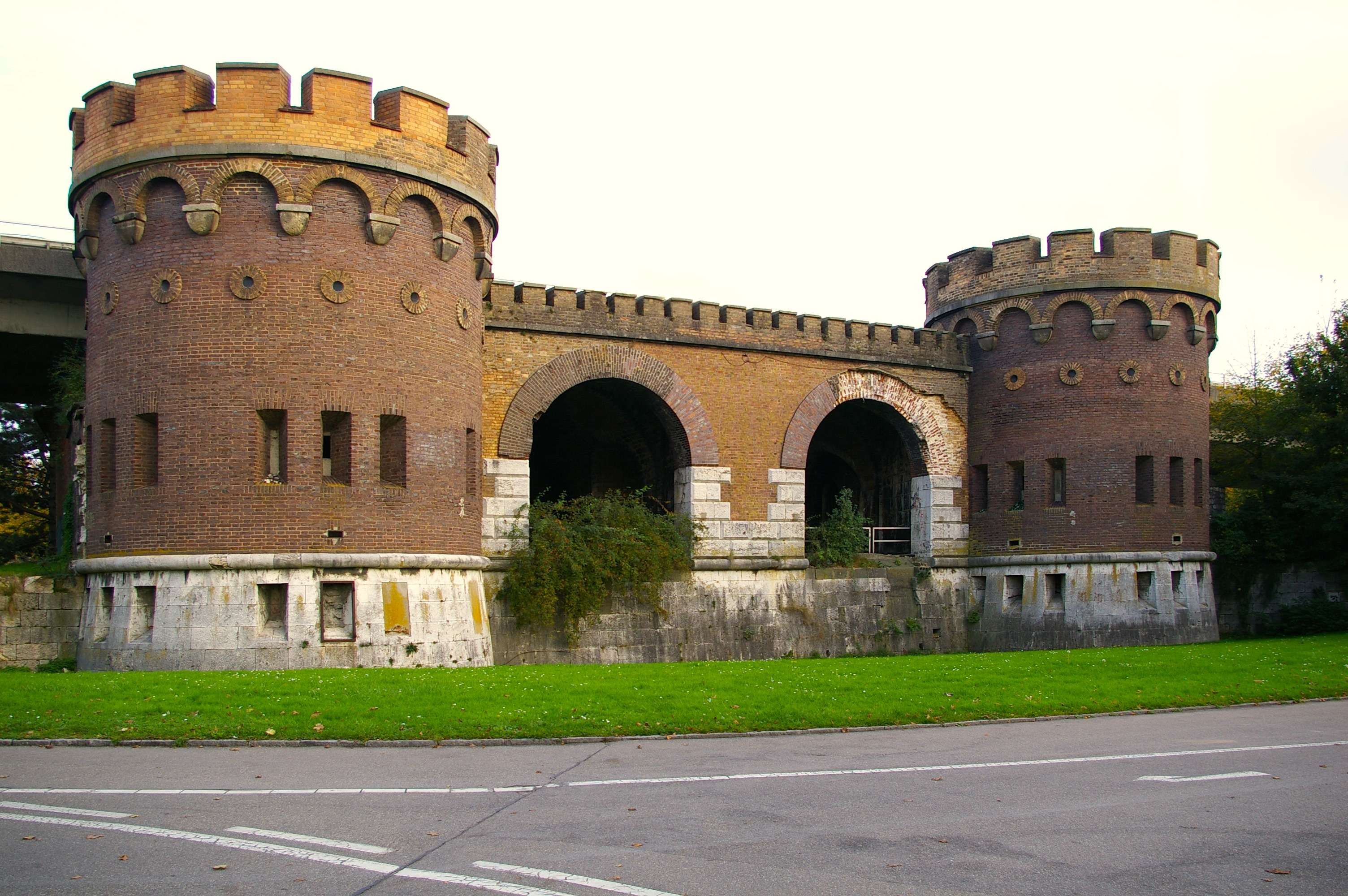 Blaubeurer Tor